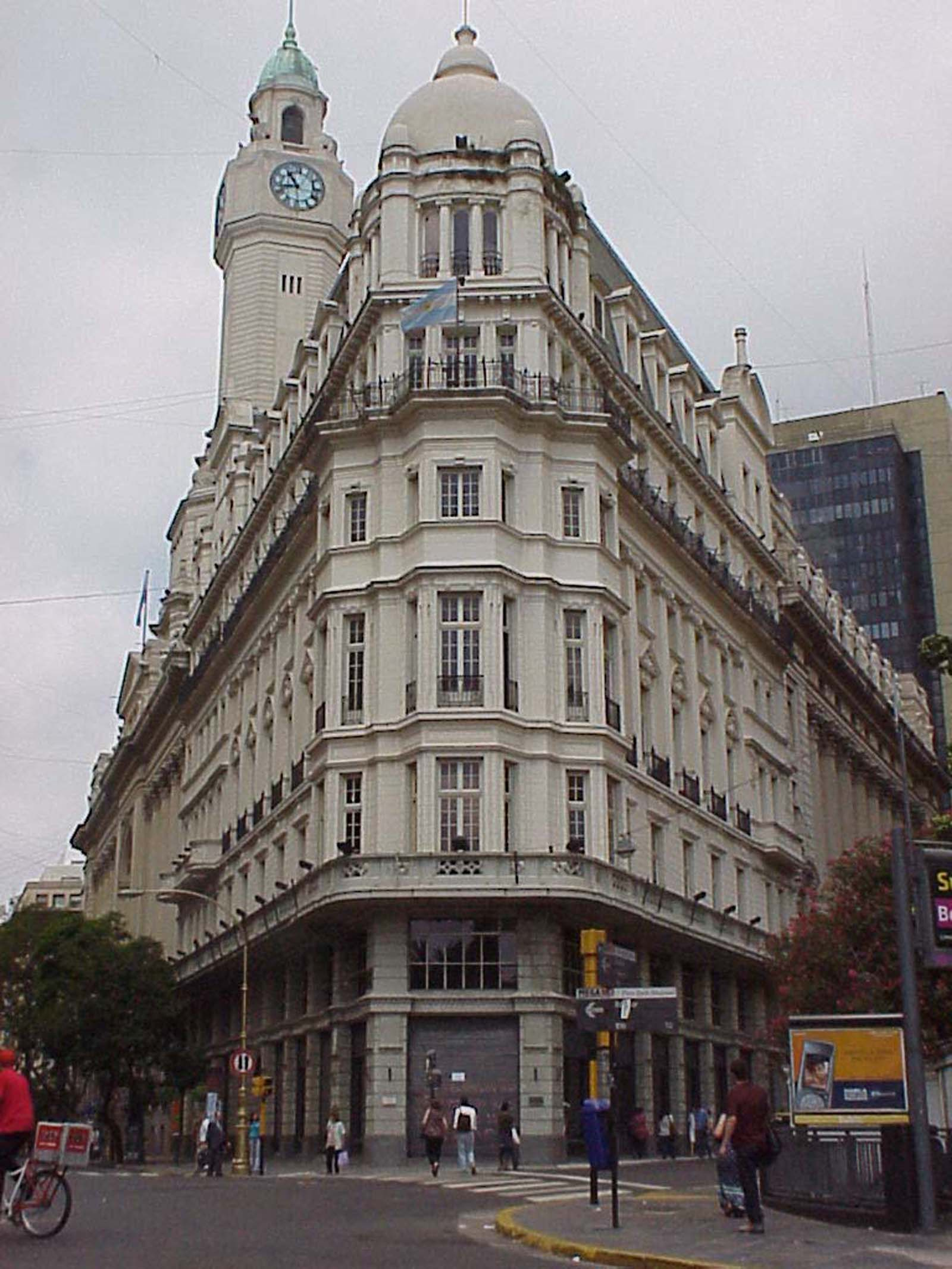 Vista exterior del Palacio de la Legislatura de la Ciudad de Buenos Aires